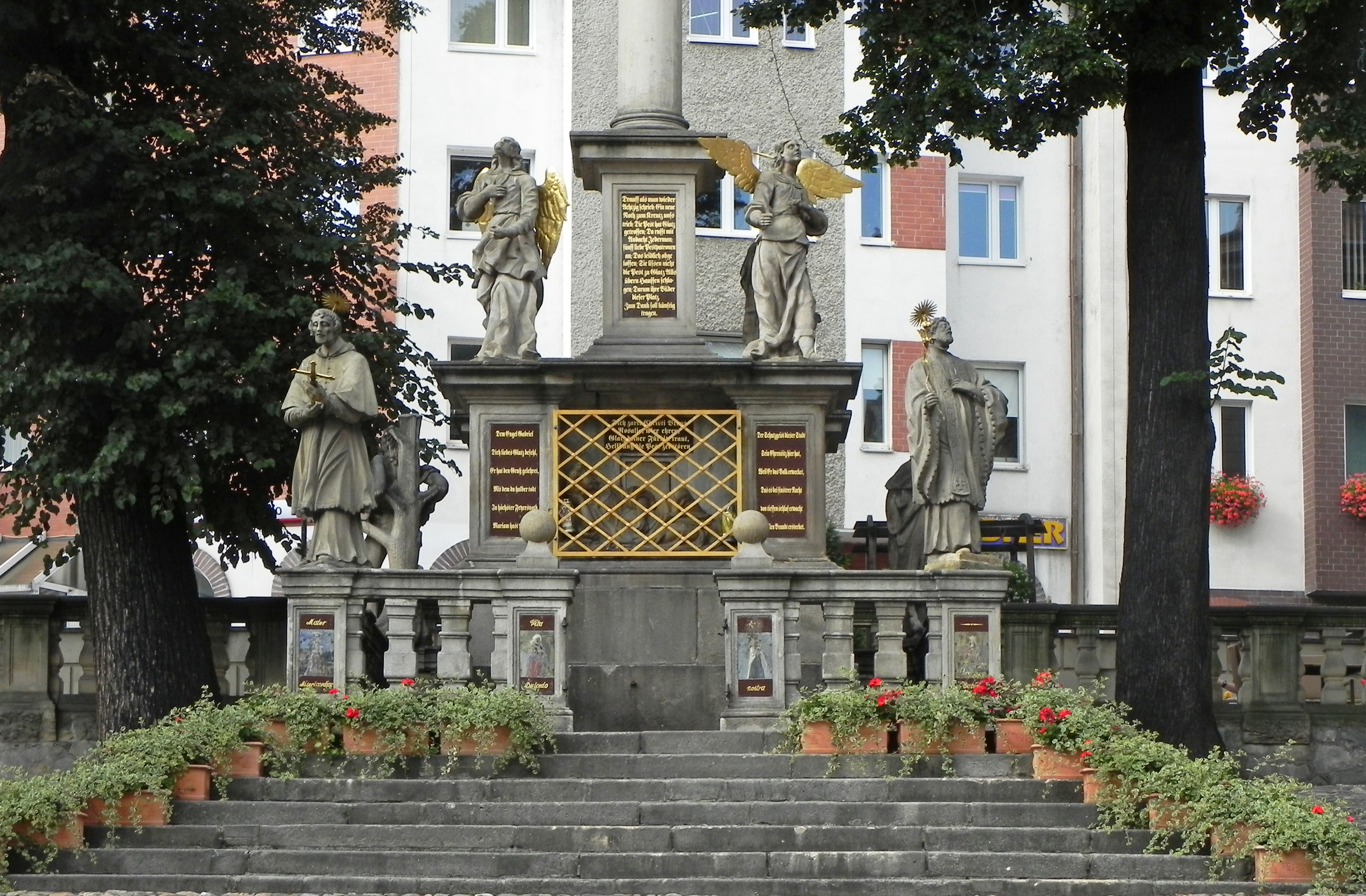 Kłodzko, kolumna z figurą Matki Boskiej, 1680